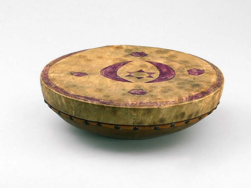 Slaginstrument. Lijsttrom Unknown language: Rabana